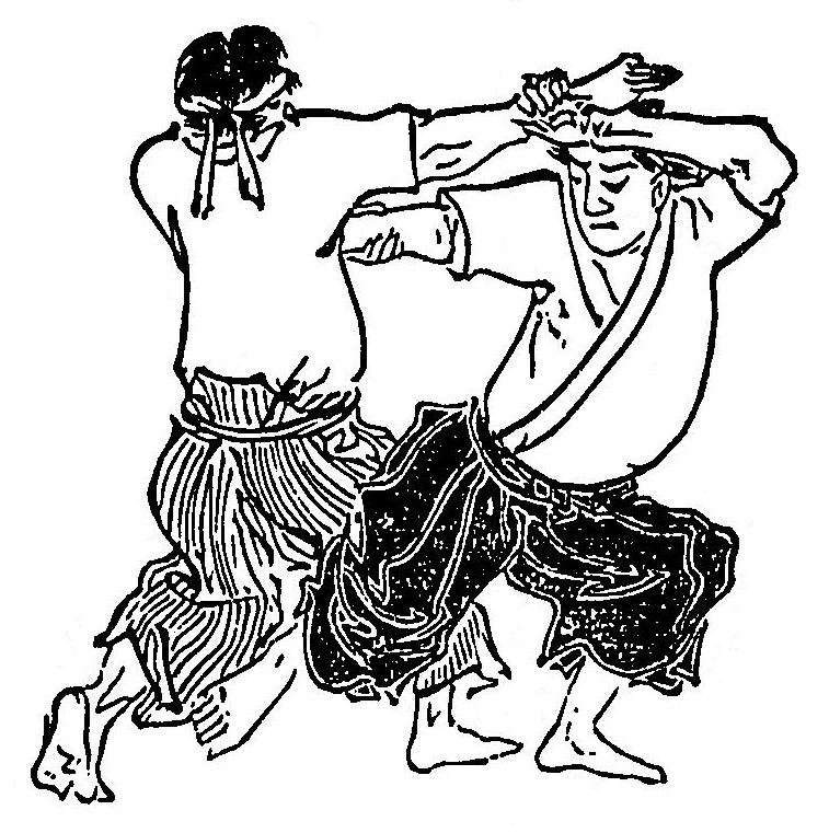 投げ捨て 片胸捕